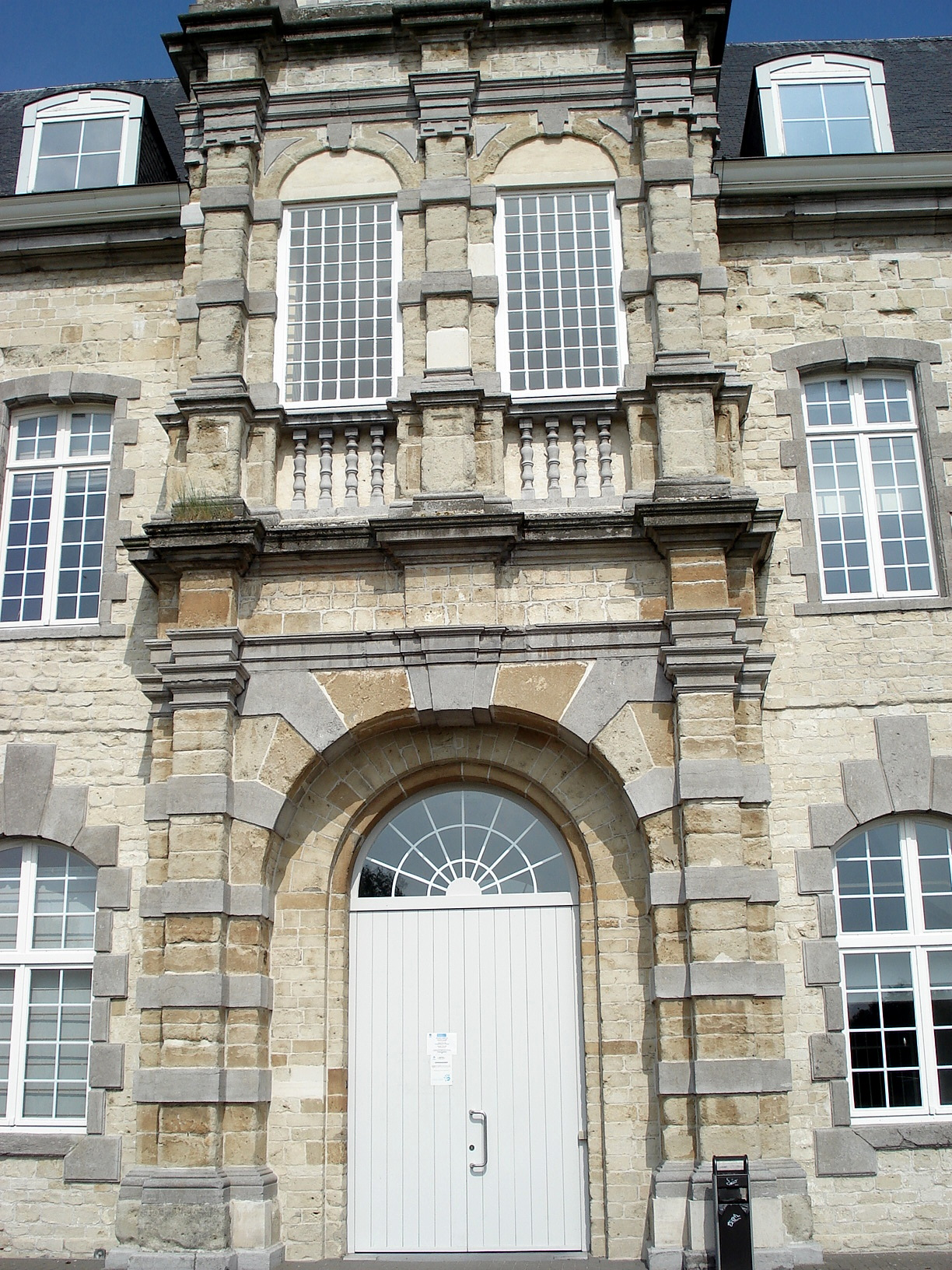 Abdij Hemiksem, westgevel, basis toren. Begin 18de eeuw.